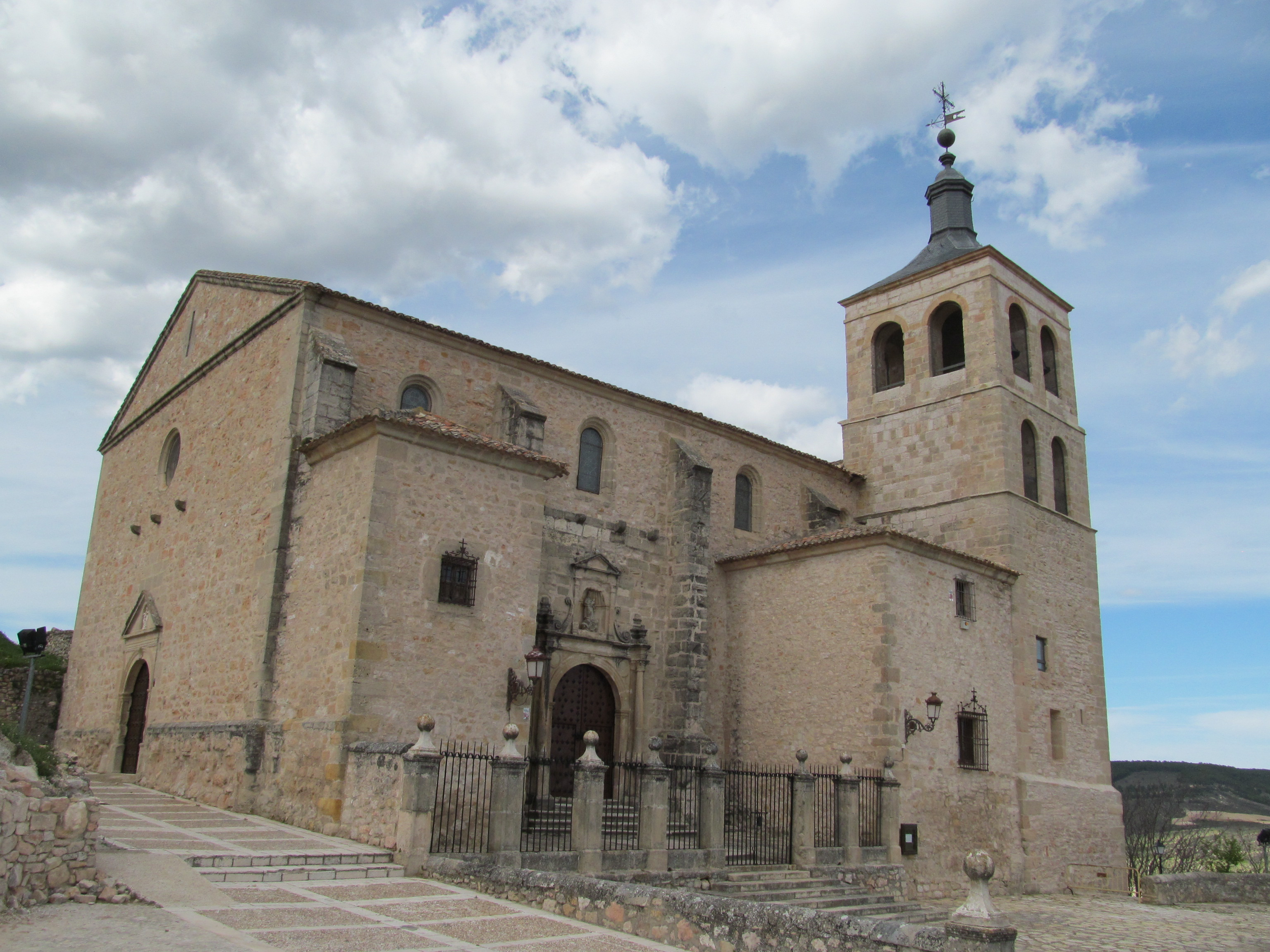 Cogolludo-Iglesia gótica de Santa María, del siglo XVI.